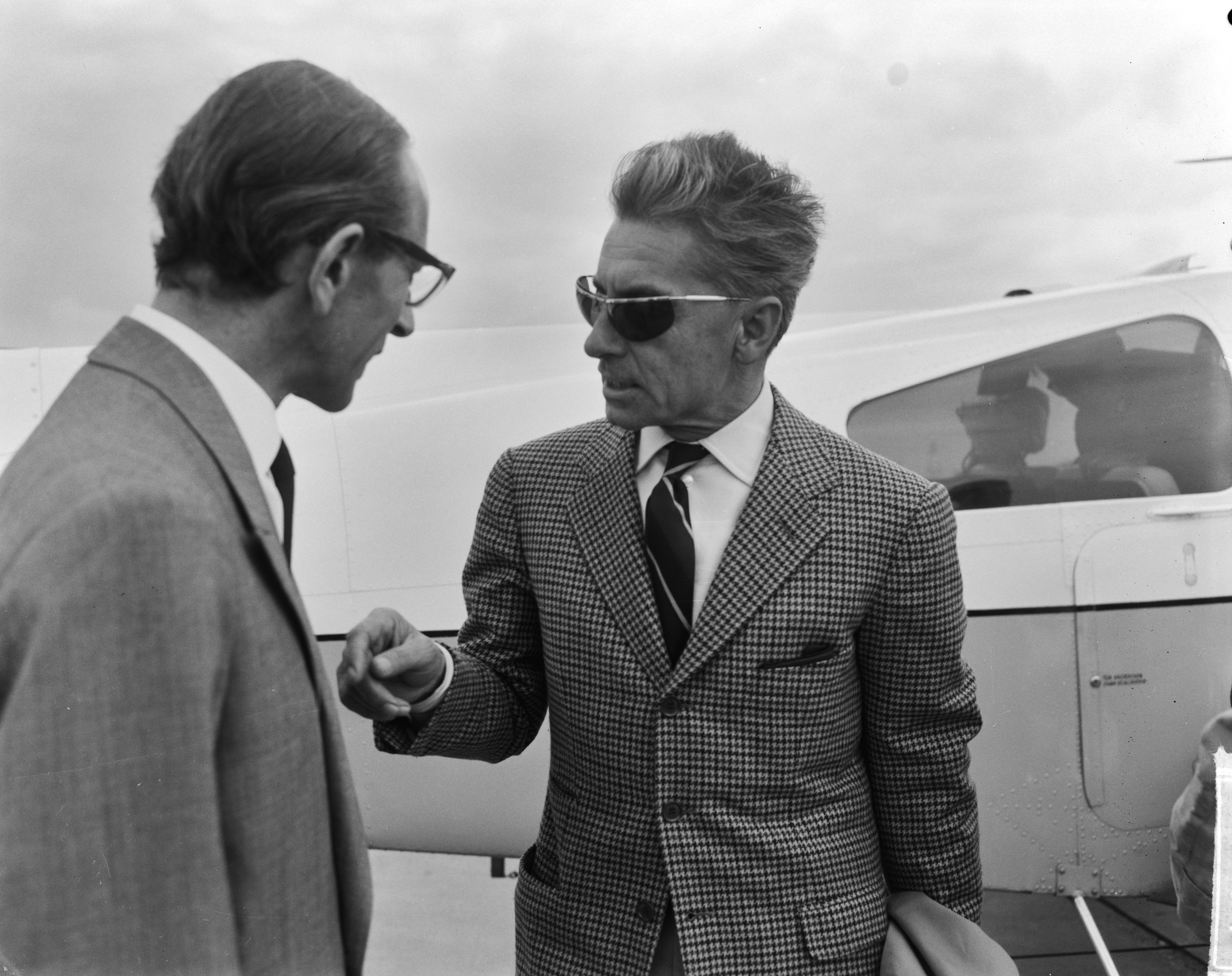 Collectie / Archief : Fotocollectie Anefo Reportage / Serie : [ onbekend ] Beschrijving : Herbert von Karajan Duitse dirigent met privetoestel op Schiphol Datum : 24 juni 1963 Locatie : Noord-Holland, Schiphol Trefwoorden : dirigenten Persoonsnaam : Herbert von Karajan Fotograaf : Bilsen, Joop van / Anefo Auteursrechthebbende : Nationaal Archief Materiaalsoort : Negatief (zwart/wit) Nummer archiefinventaris : bekijk toegang 2.24.01.04 Bestanddeelnummer : 915-2942